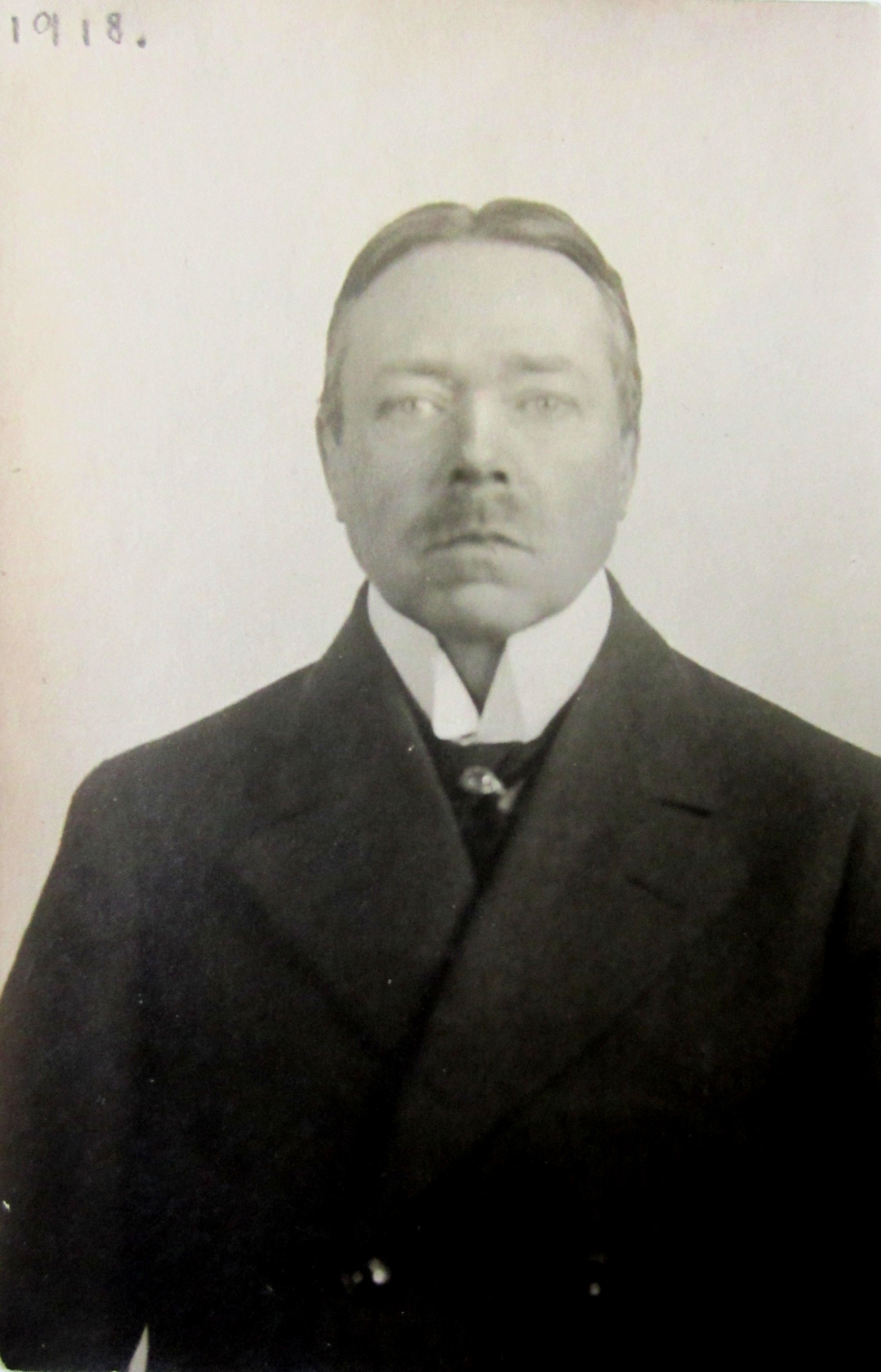 Hjalmar Söderberg, 1918, Göteborgs universitetsbibliotek, Tom Söderbergs fotoarkiv 2-22. Hjalmar Söderbergs arkiv H 58:2a.